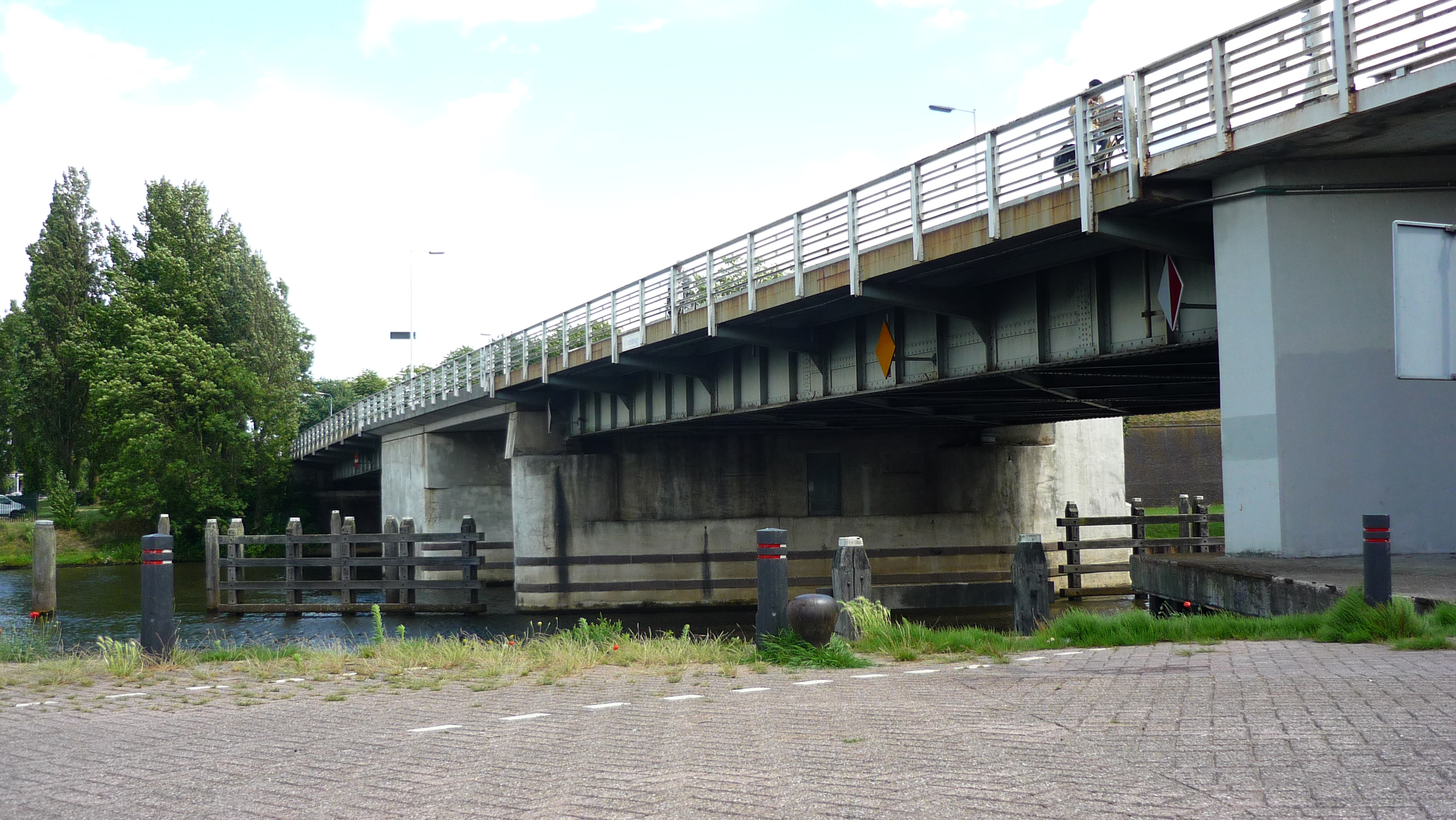 Diezebrug te Den Bosch.